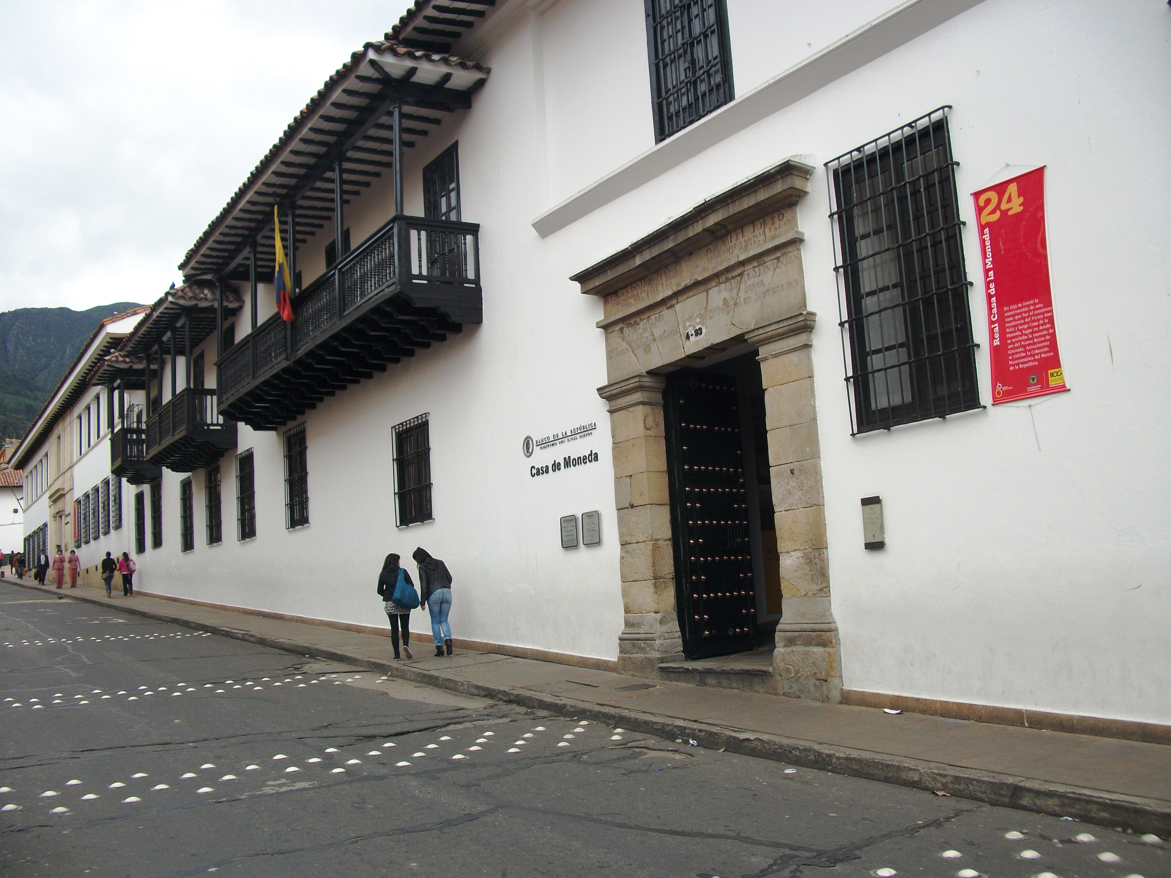 Casa de la Moneda en Bogotá, frente a la sala de conciertos del costado norte de la Biblioteca Luis Ángel Arango.